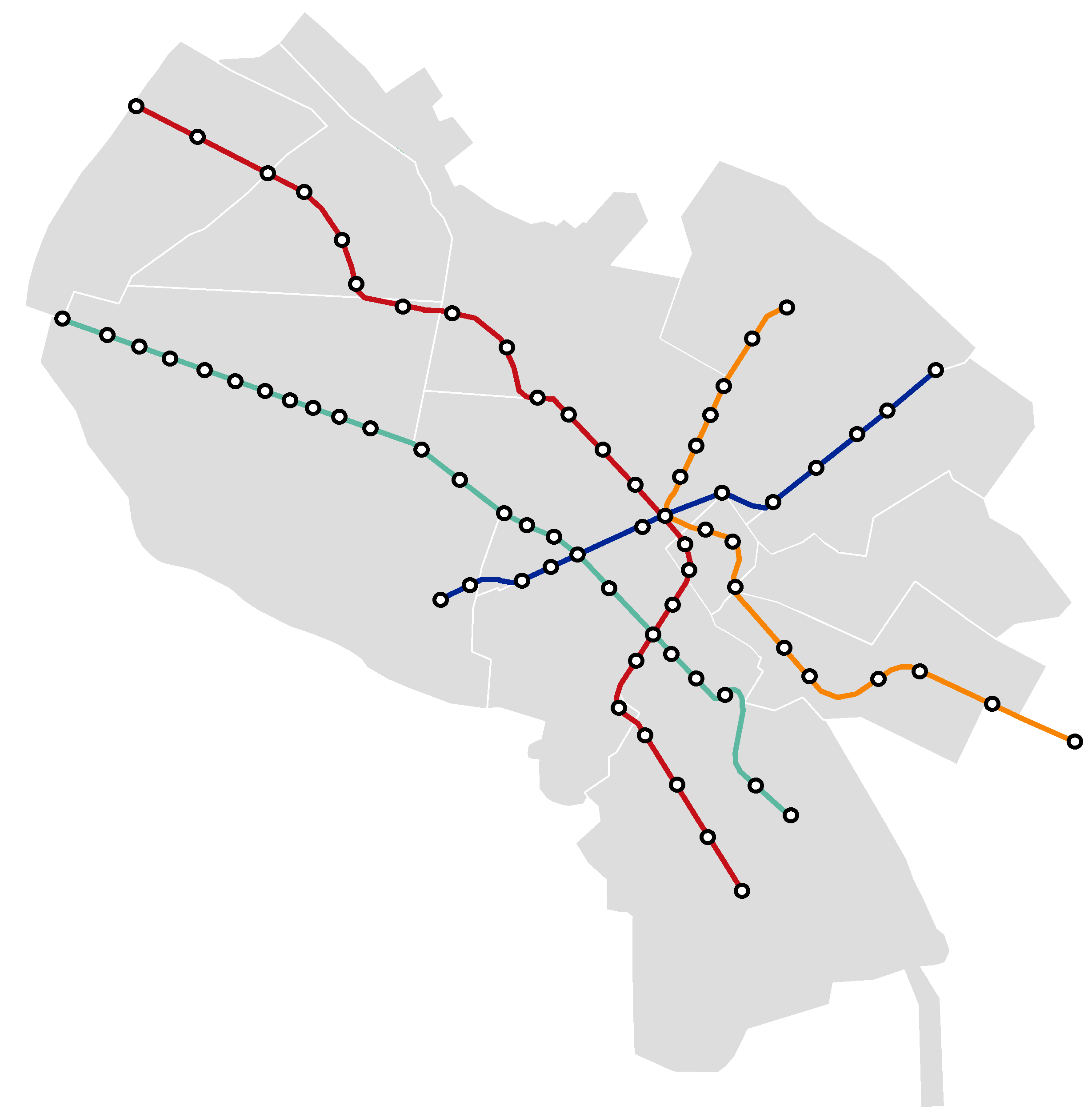 نقشه آینده خطوط مترو مشهد